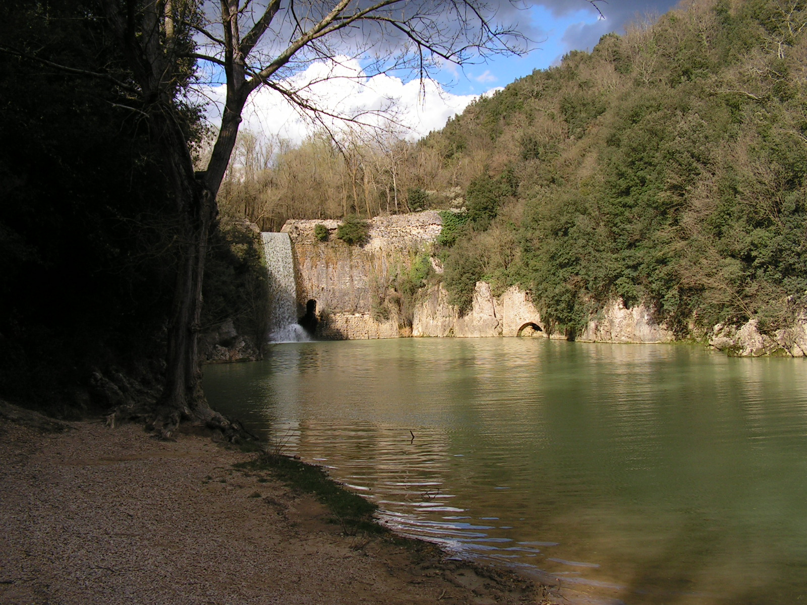 Riccardo Passagrilli Scorcio del Rio Grande. diga del XII secolo - Amelia Italia